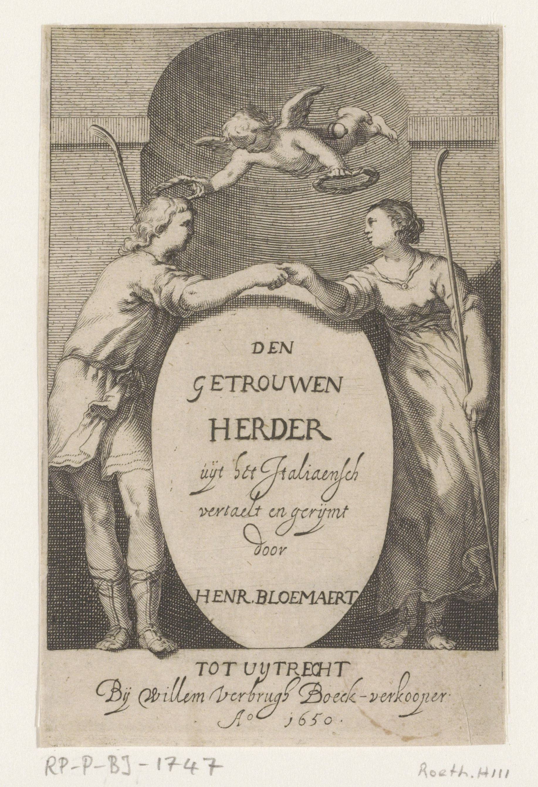 IdentificatieTitel(s): Titelpagina voor: Den getrouwen herder, 1650Objecttype: prent titelpagina Objectnummer: RP-P-BI-1747Catalogusreferentie: Roethlisberger H111Opschriften / Merken: verzamelaarsmerk, verso, gestempeld: Lugt 240Omschrijving: Een herder en een herderin geven elkaar de hand boven een schild met de titel van het boek. Een putto legt beiden een krans op het hoofd.VervaardigingVervaardiger: prentmaker: Frederick Bloemaert (toegeschreven aan)naar eigen ontwerp van: Frederick Bloemaert (toegeschreven aan)uitgever: Willem Verburgh (vermeld op object)Plaats vervaardiging: UtrechtDatering: 1650Fysieke kenmerken: gravureMateriaal: papier Techniek: graveren (drukprocedé)Afmetingen: blad: h 140 mm × b 92 mmToelichtingtitelpagina voor: Guarini (auteur), H. Bloemaert (vertaler), Den getrouwen herder, Utrecht, W. Verbrugh, 1650.OnderwerpWat: title-pageVerwerving en rechtenVerwerving: overdracht van beheer 1816Copyright: Publiek domein